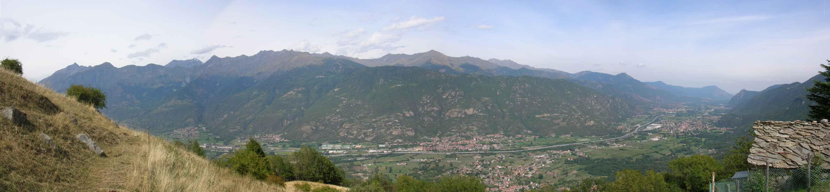 Panorama Bassa Val Susa